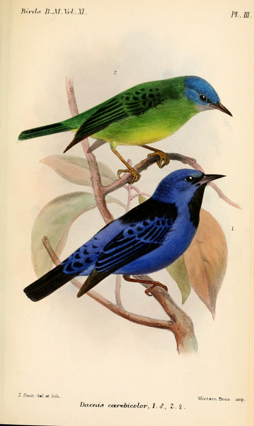 Dacnis coerebicolor = Dacnis cayana coerebicolor, Blue Dacnis ssp